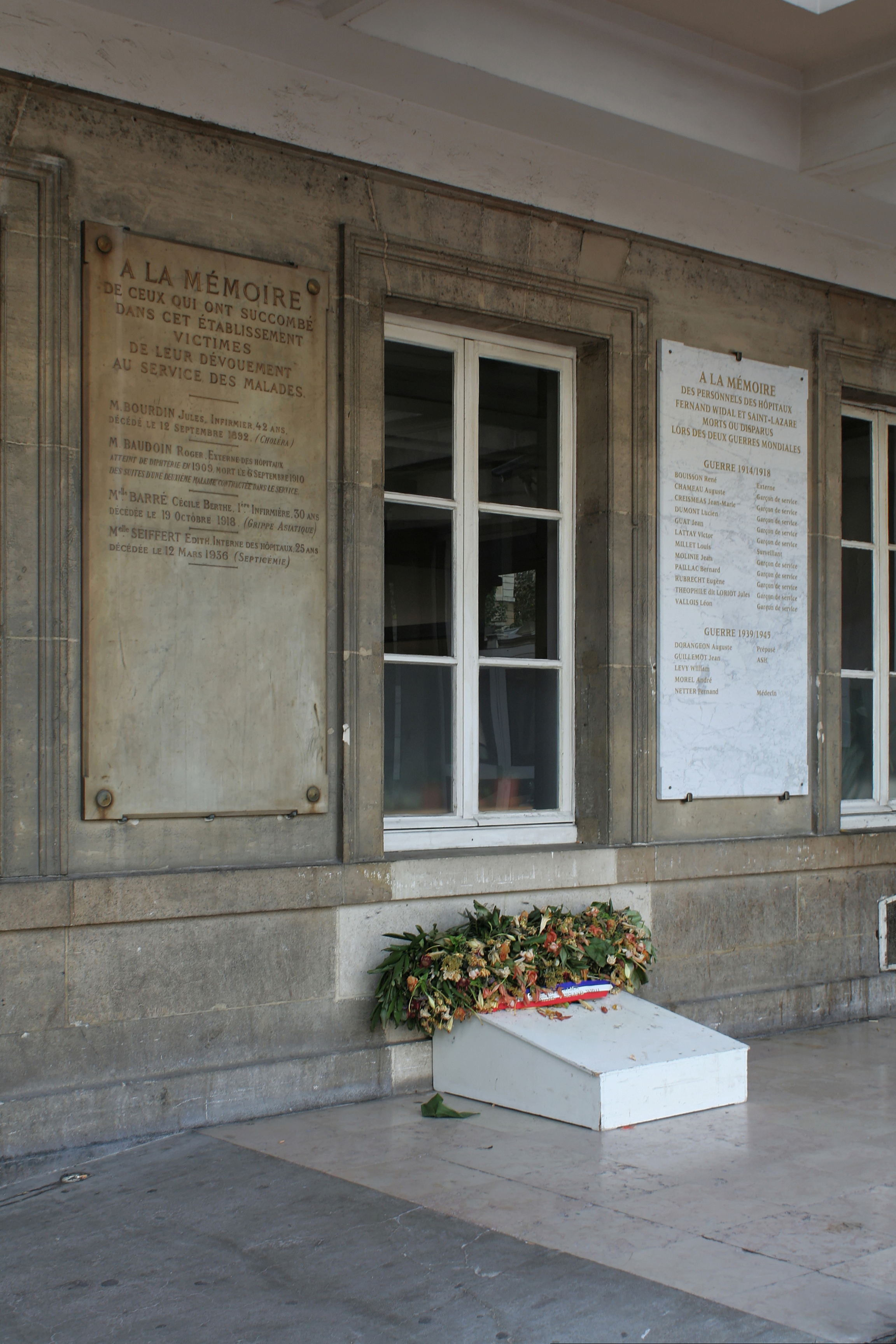 Hôpital Fernand-Widal, Paris 10e. Monuments au morts.